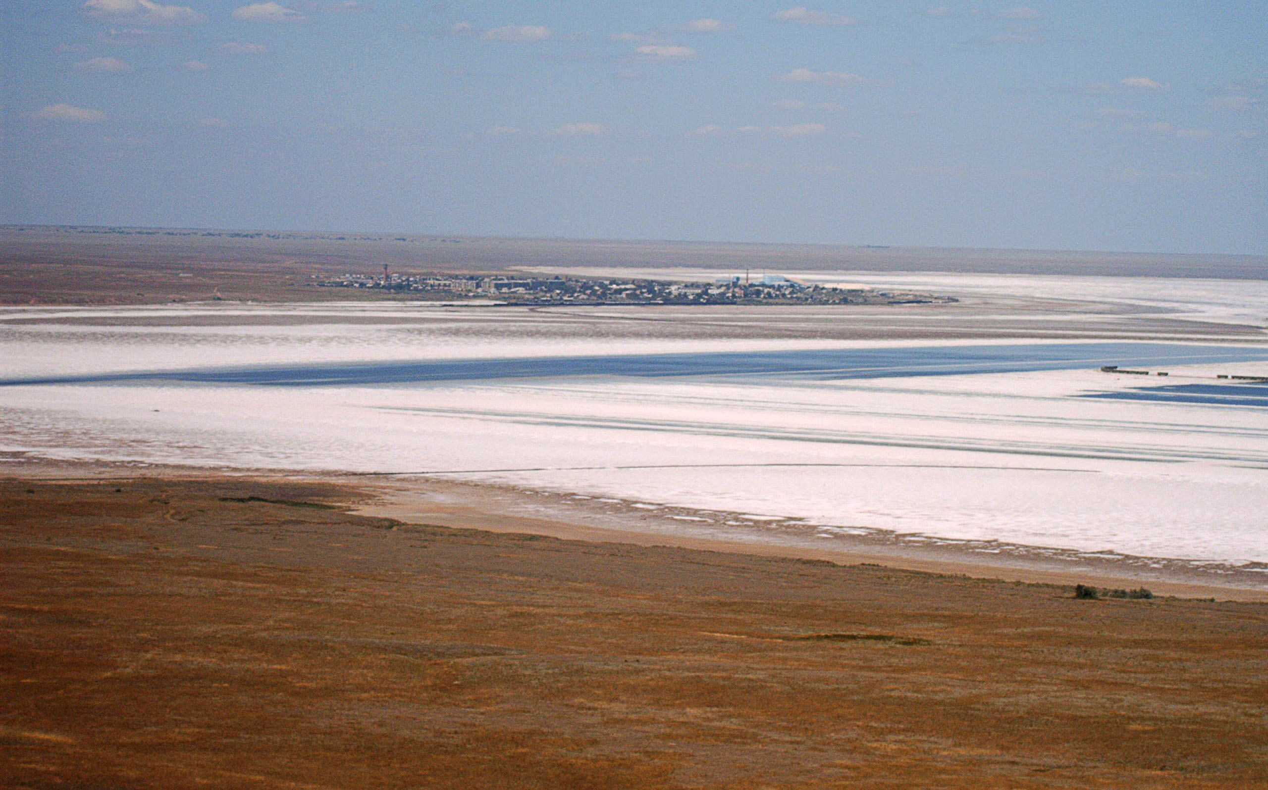 Соленое озеро Баскунчак, Ахтубинский район